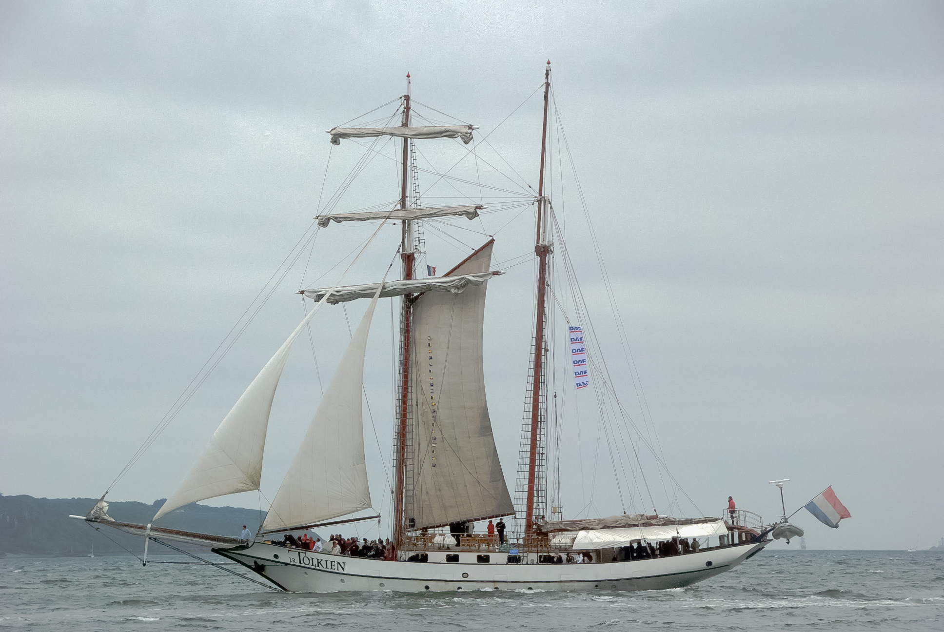 Tonnerres de Brest 2012